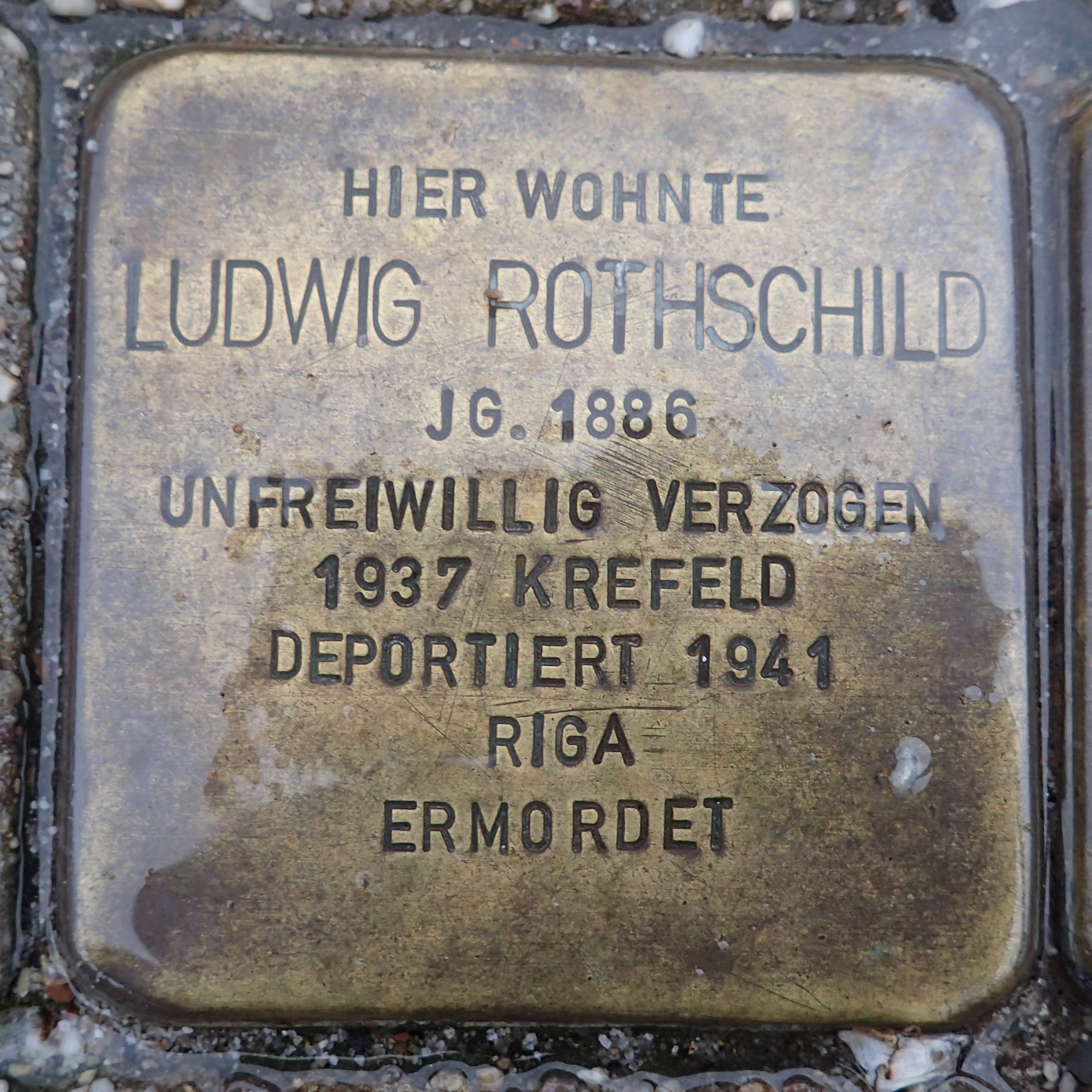 Stolperstein Geldern Brühlscher Weg 27 Ludwig Rothschild